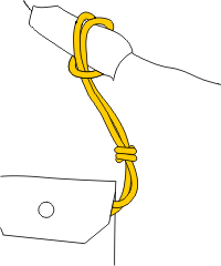 Harcerski sznur służbowy noszony z ramienia